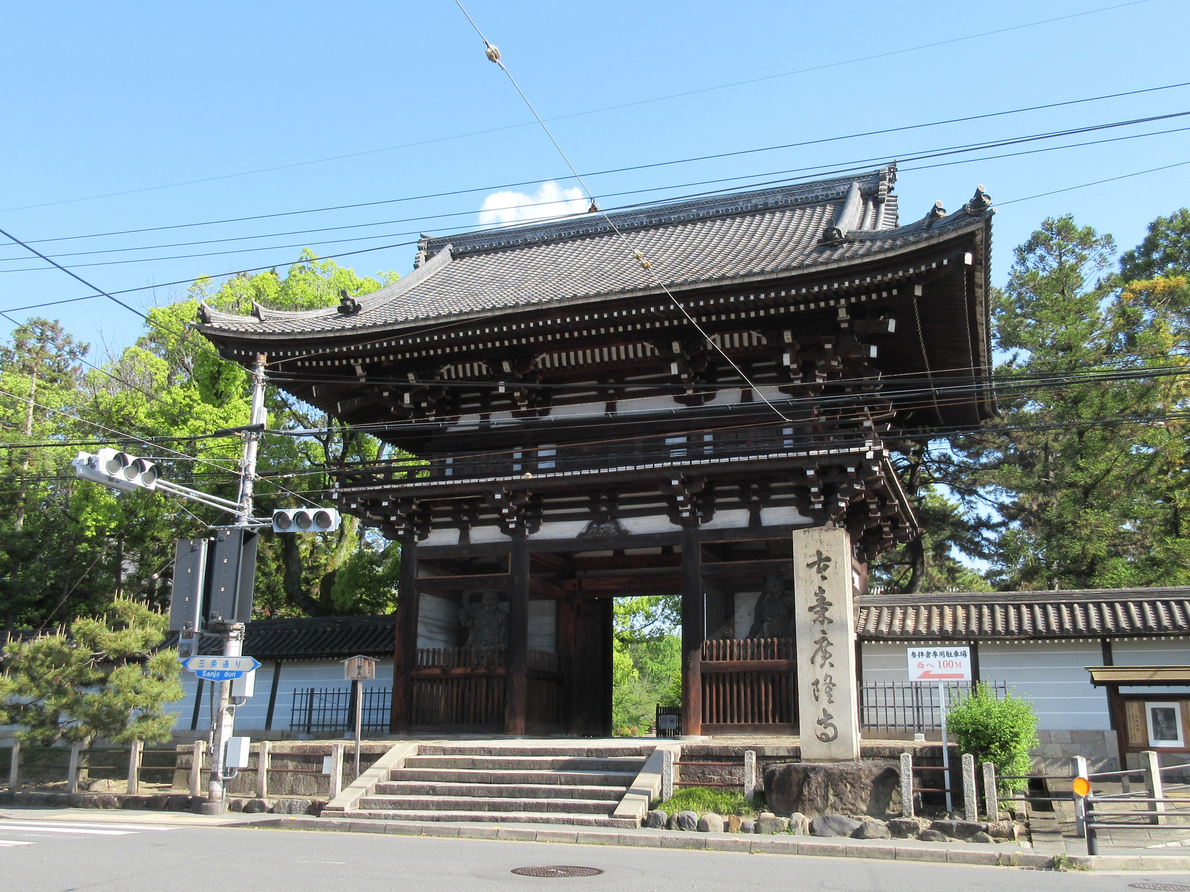 広隆寺楼門